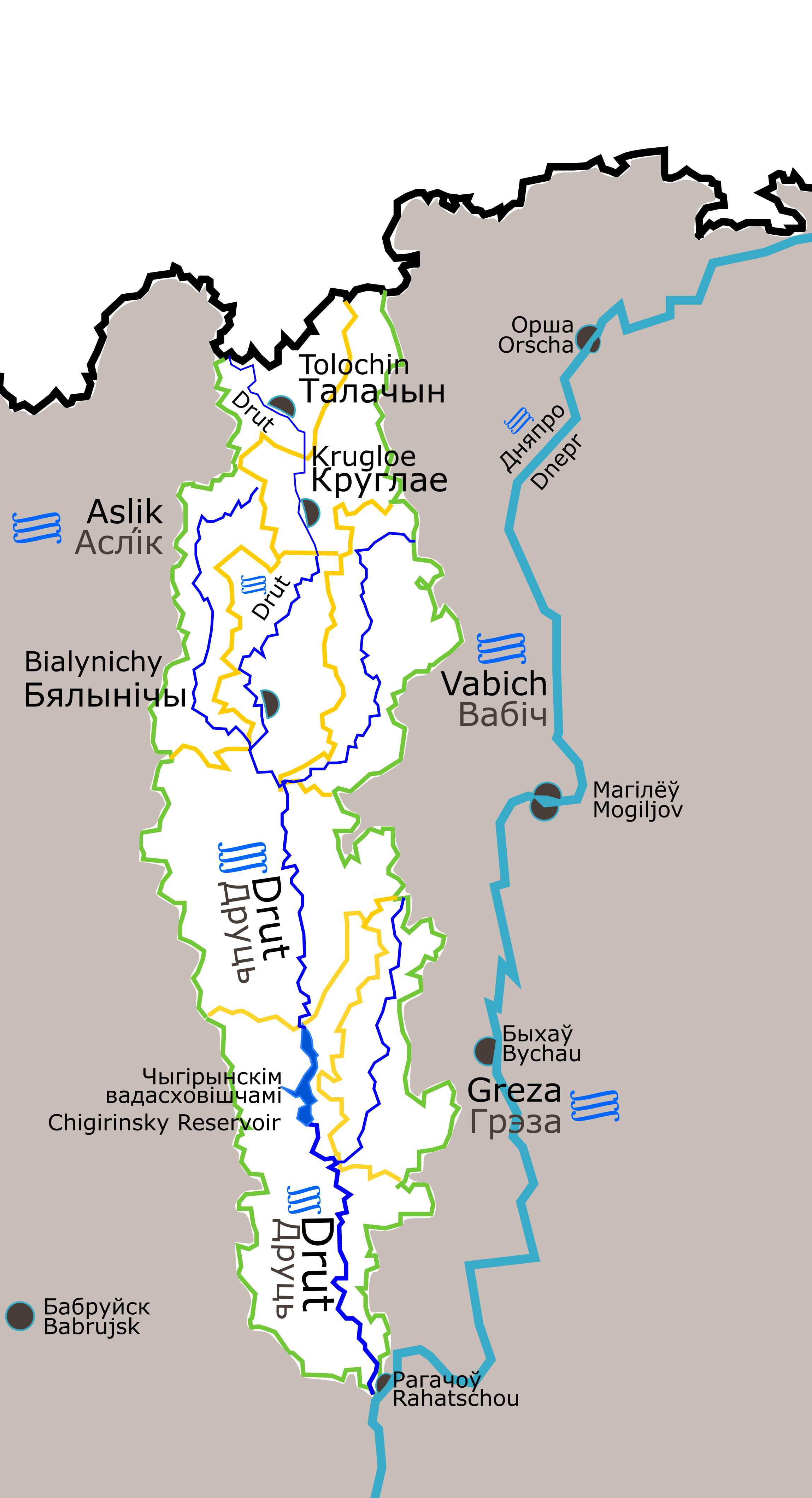 Das Drut-Becken mit Zufluß zum Dnepr in Weißrussland. Zuflüsse: Aslik Vabich Greza